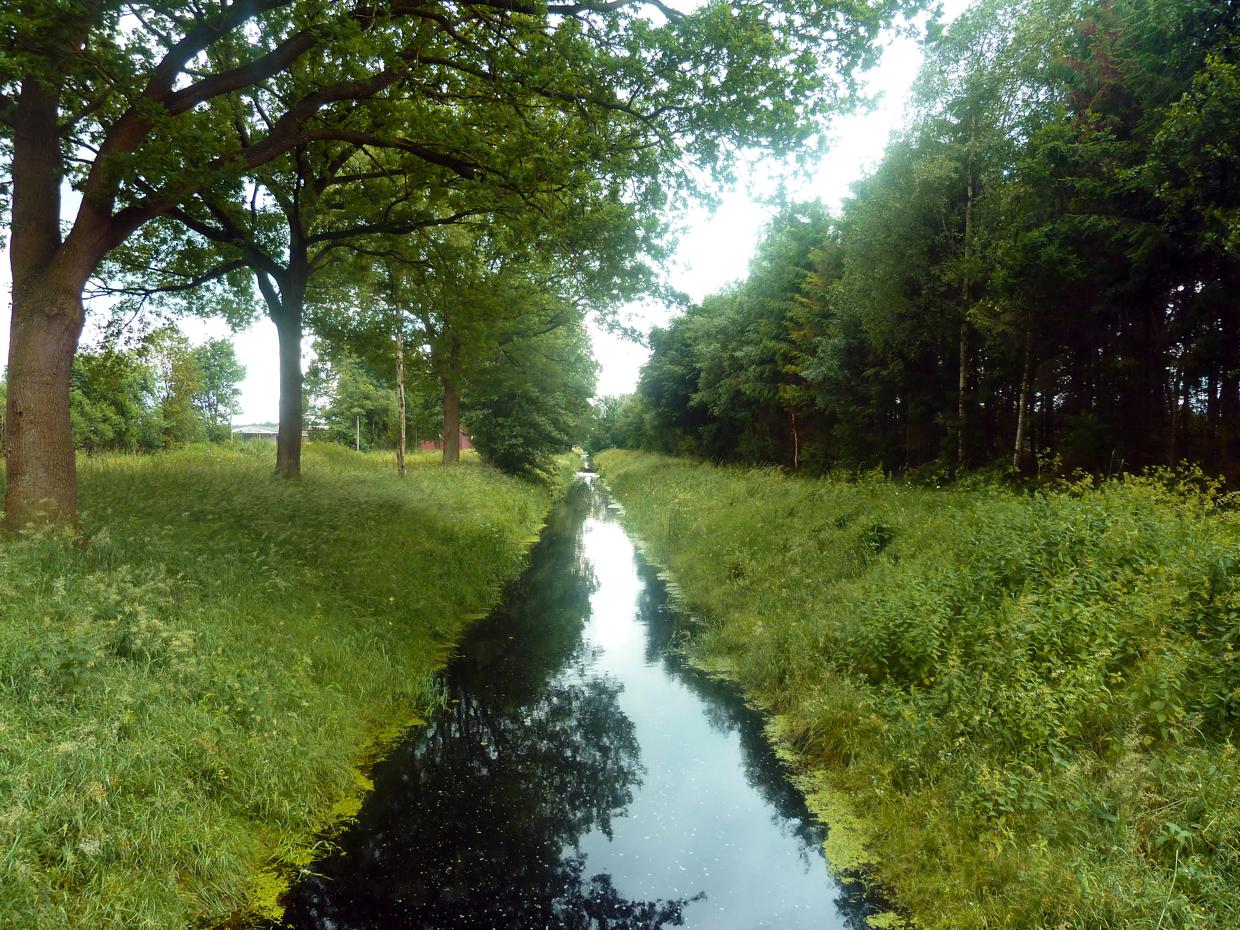 Der Oste-Hamme-Kanal flussaufwärts. Aufgnommen in Spreckens.